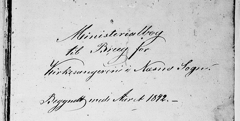 Tittelblad på klokkerbok fra Nesna 1842